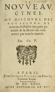 "Le novveav Cynee" von Emeric Crucé aus dem Jahr 1623